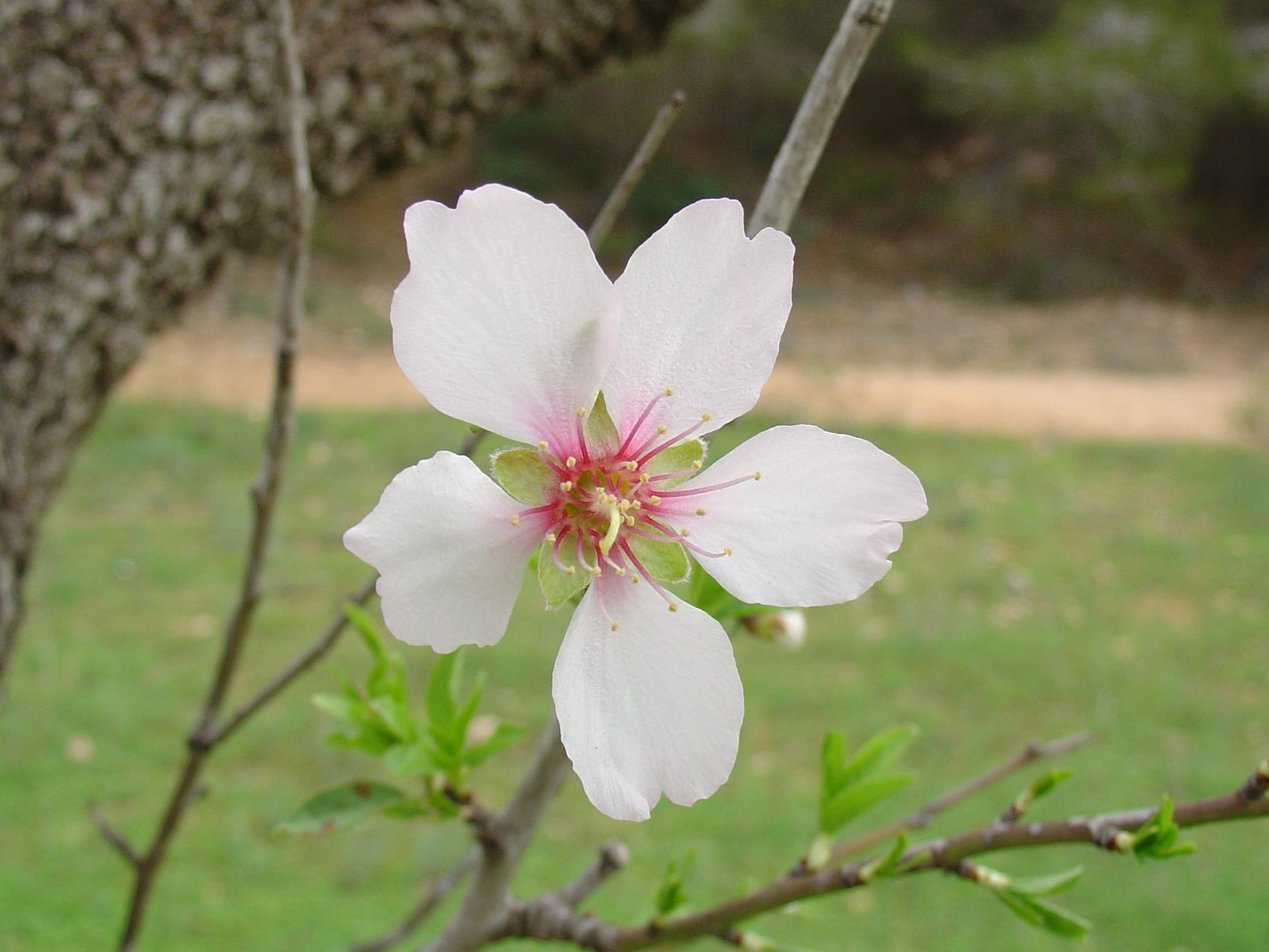 Prunus dulcis flower, flor de almendro procedente de Canteras, Cartagena, Murcia, Spain